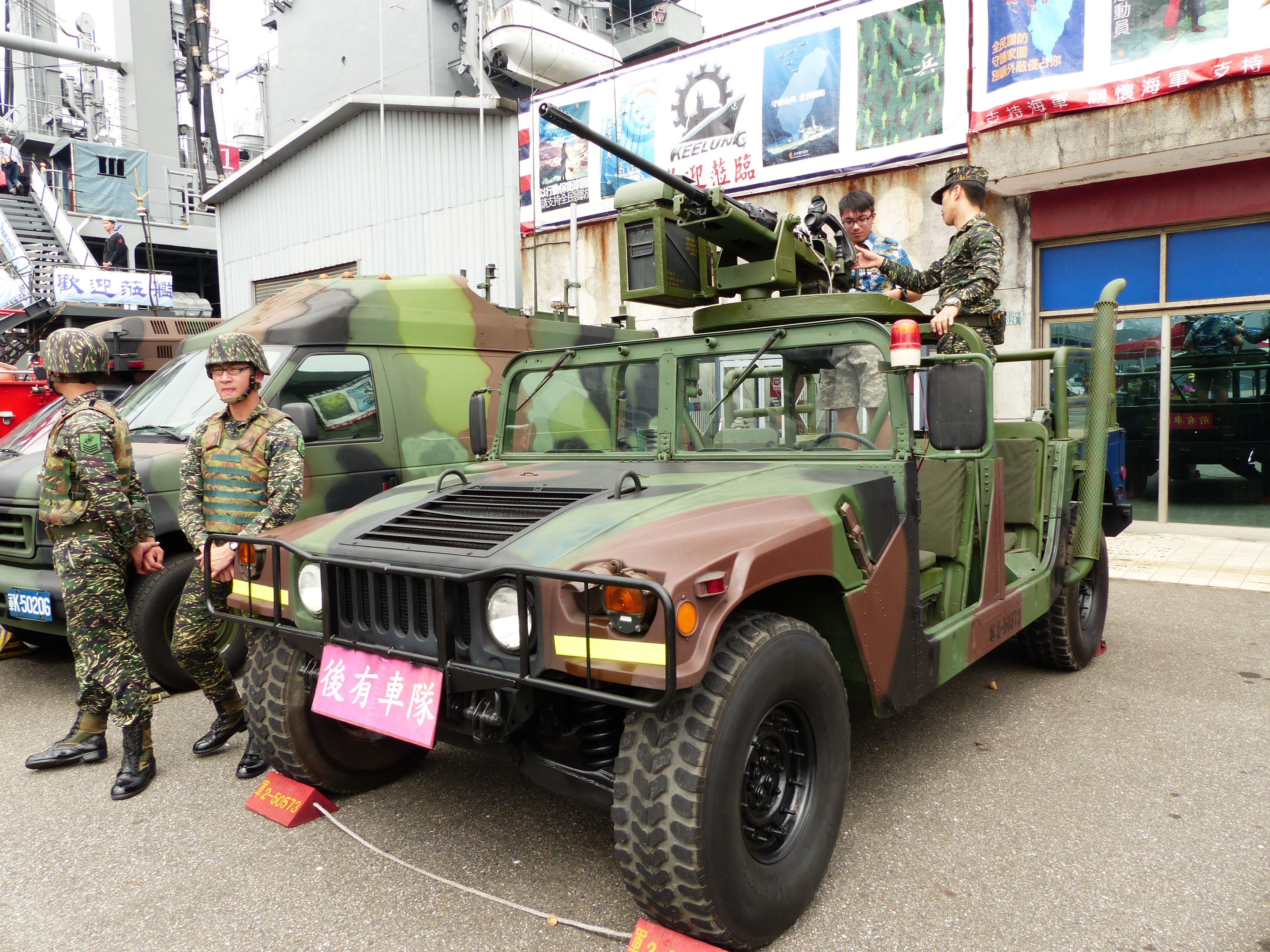 海軍陸戰隊士官為遊客講解悍馬車上的T-75M 20mm機關砲。